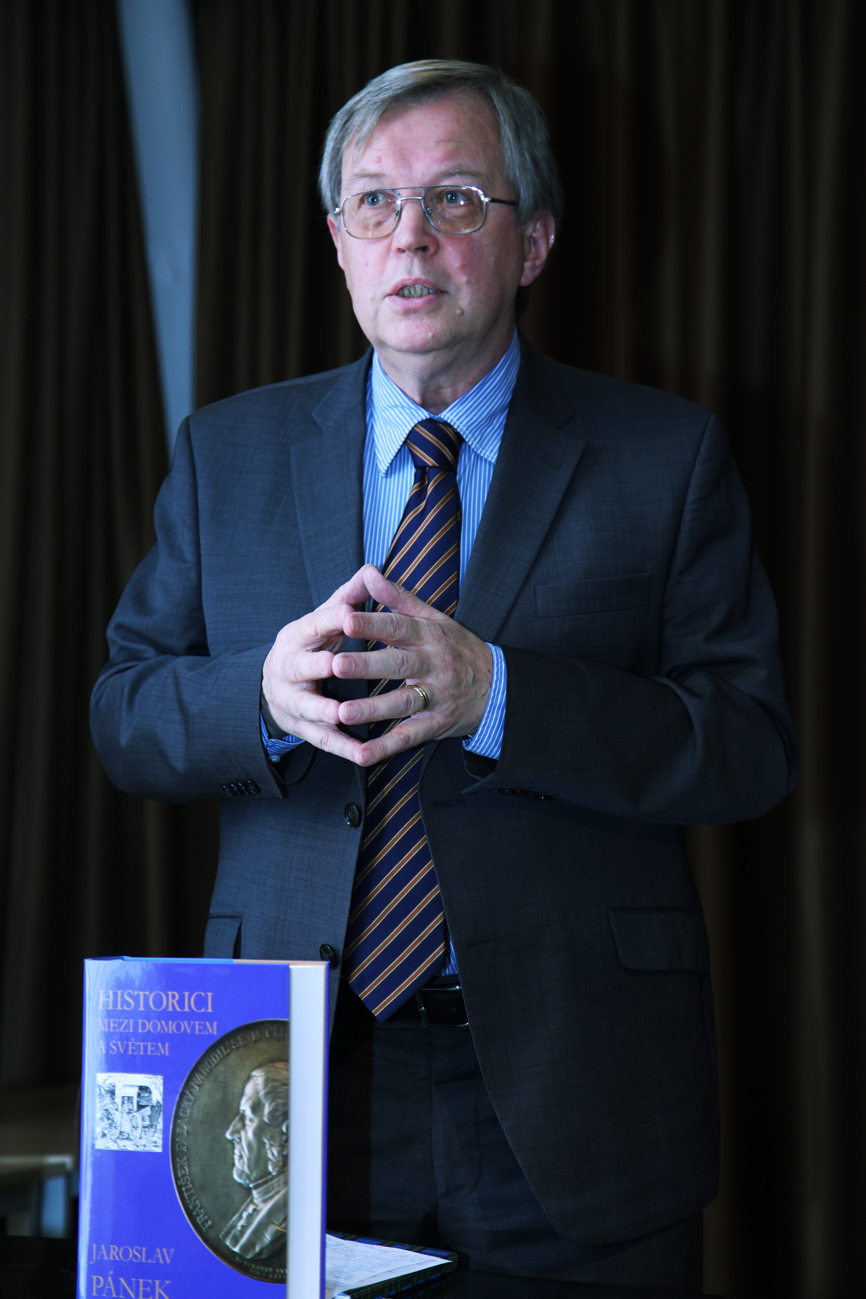 Jaroslav Pánek (* 23. ledna 1947 Praha) je český historik, odborník na české a středoevropské dějiny raného novověku.